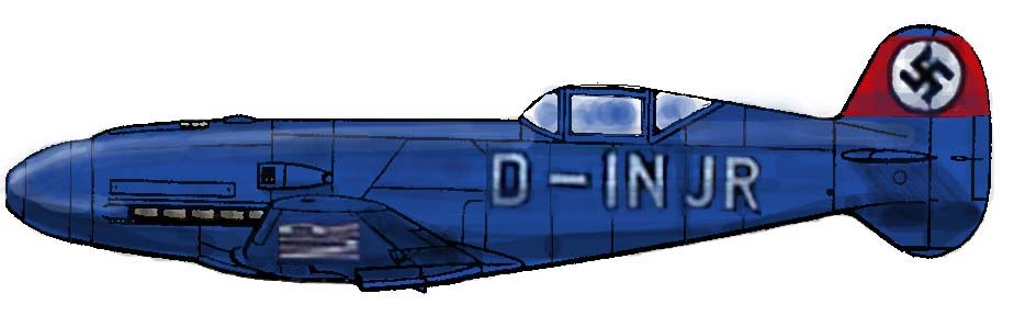 Me 209 V1 mit der Werksnummer 1185 und der zivilen Kennung D-INJR